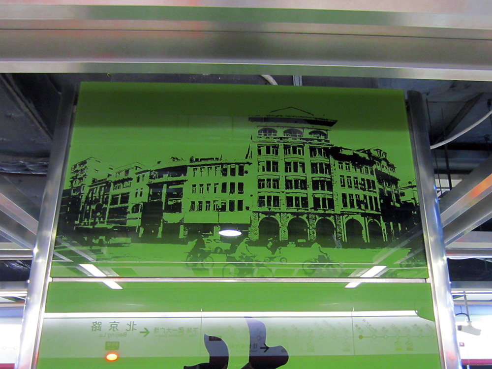 北京路站柱面裝飾